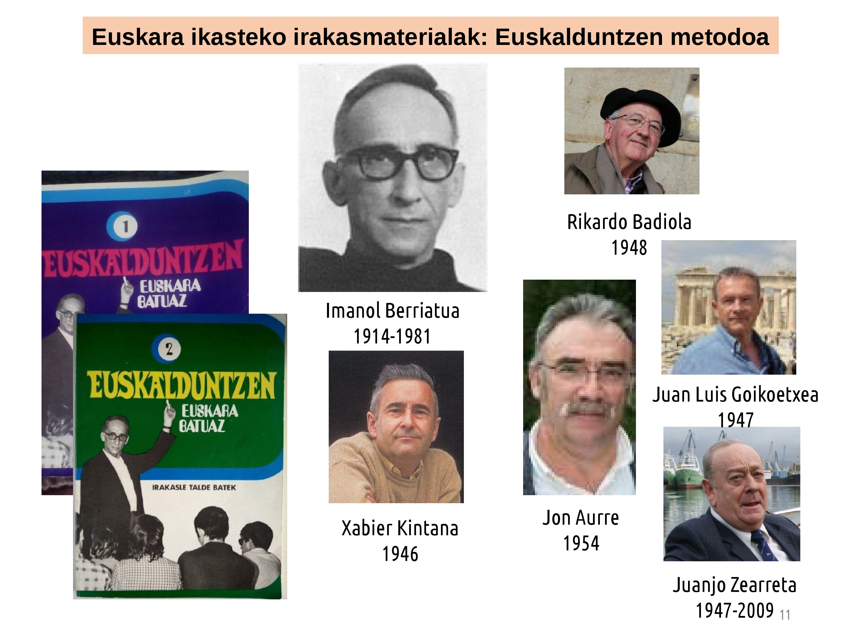 Euskara ikasteko Euskalduntzen metodoa. Euskara Batuaren helduaroa Jardunaldiaren barruan (Gasteiz, 2018-06-21). Jose Ramon Etxebarriak bere hitzaldian euskarazko testugintzan bere helburuak, lanak eta bidelagunak aipatu zituen (Euskarazko testugintza. Amaitu gabeko historiaren atal baten bertsio pertsonala).